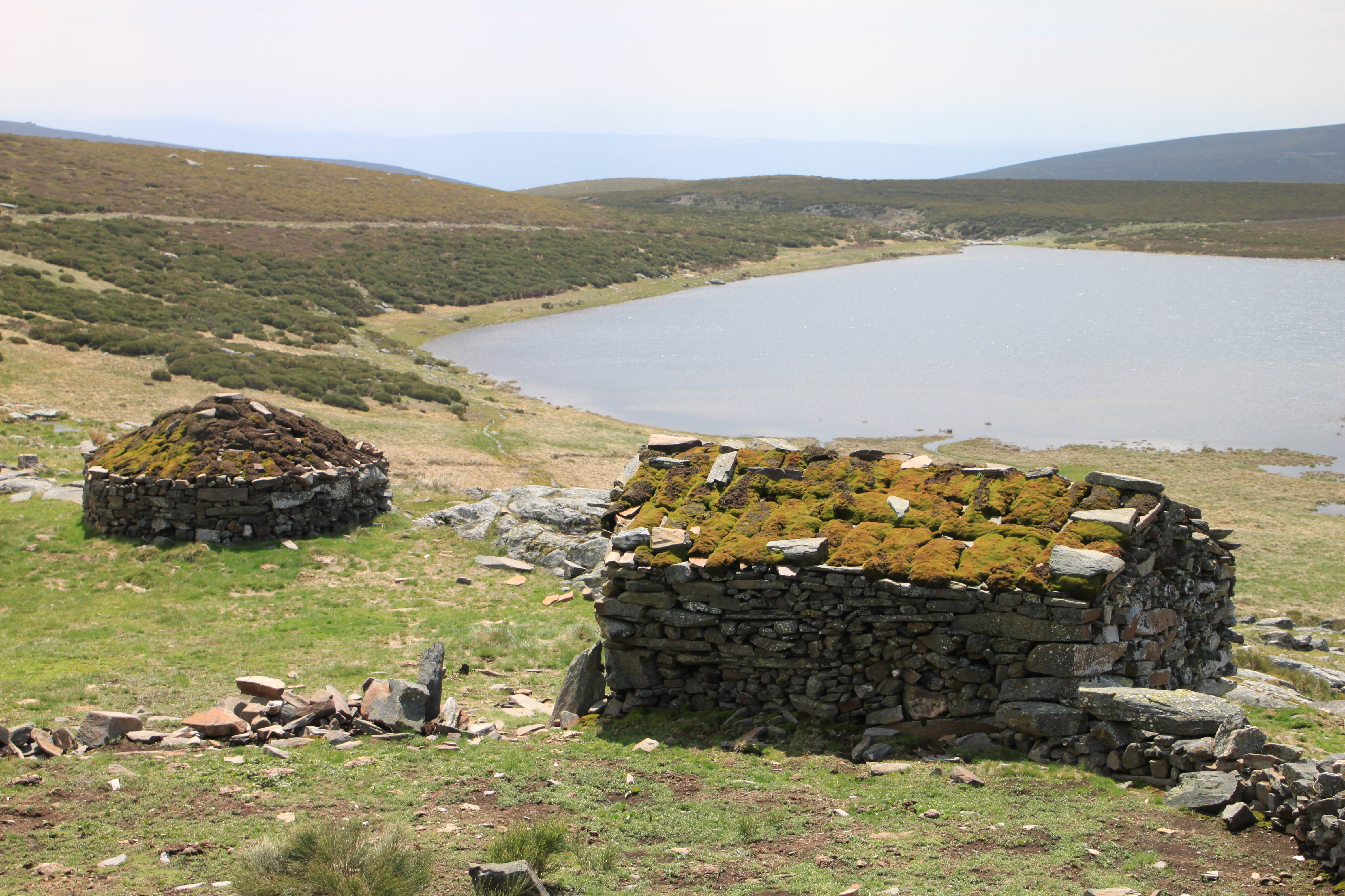 En los montes que rodean el Lago de Sanabria, subiendo desde San Martín de Castañeda, se halla la ruta que lleva de la "Laguna de los peces" a la "Laguna de las yeguas"; en ésta, aún se conservan las chozas que los pastores usaban como refugio.